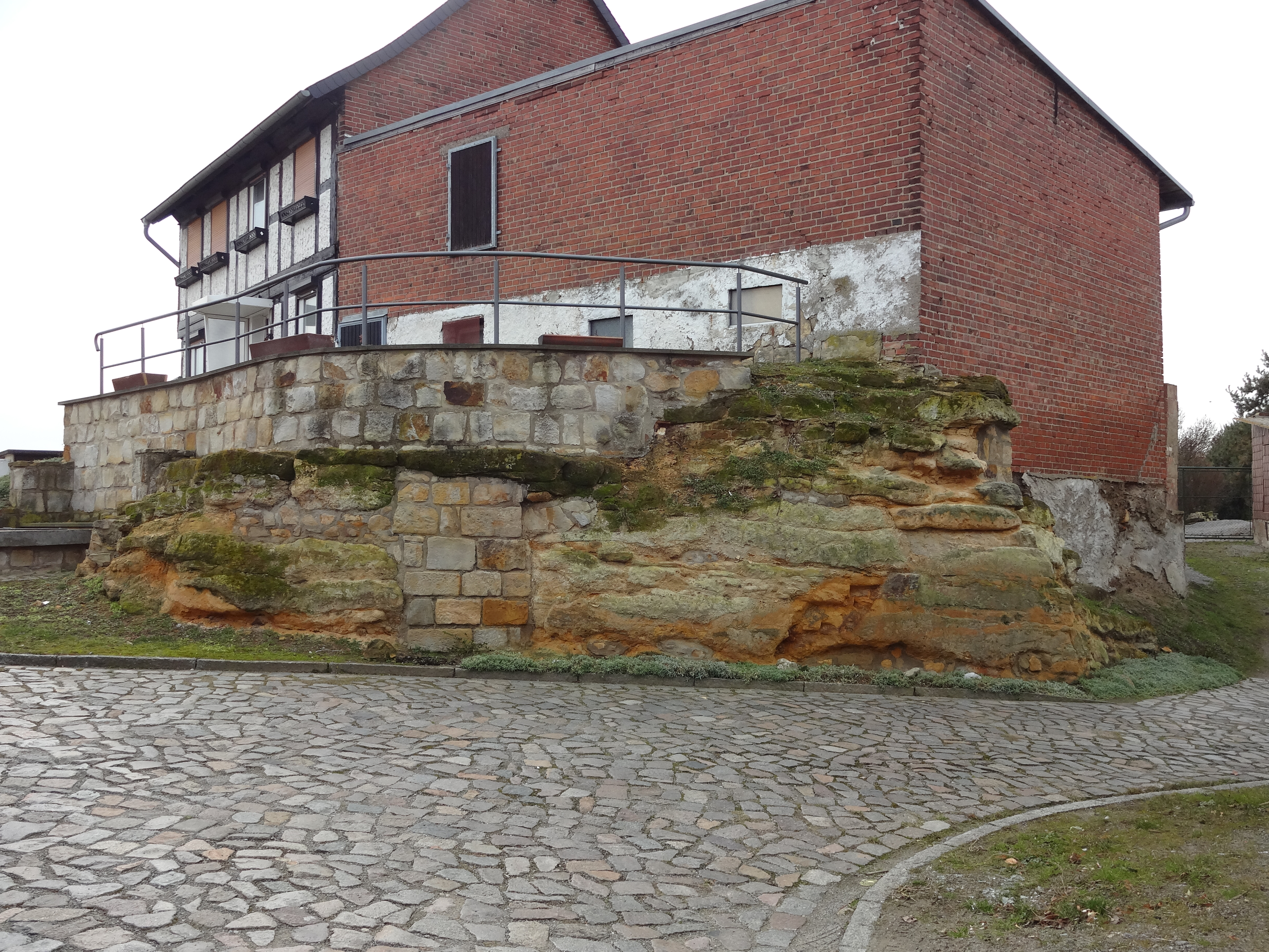 Reste der denkmalgeschützten Burg Derenburg in Derenburg, Ortsteil von Blankenburg (Harz)